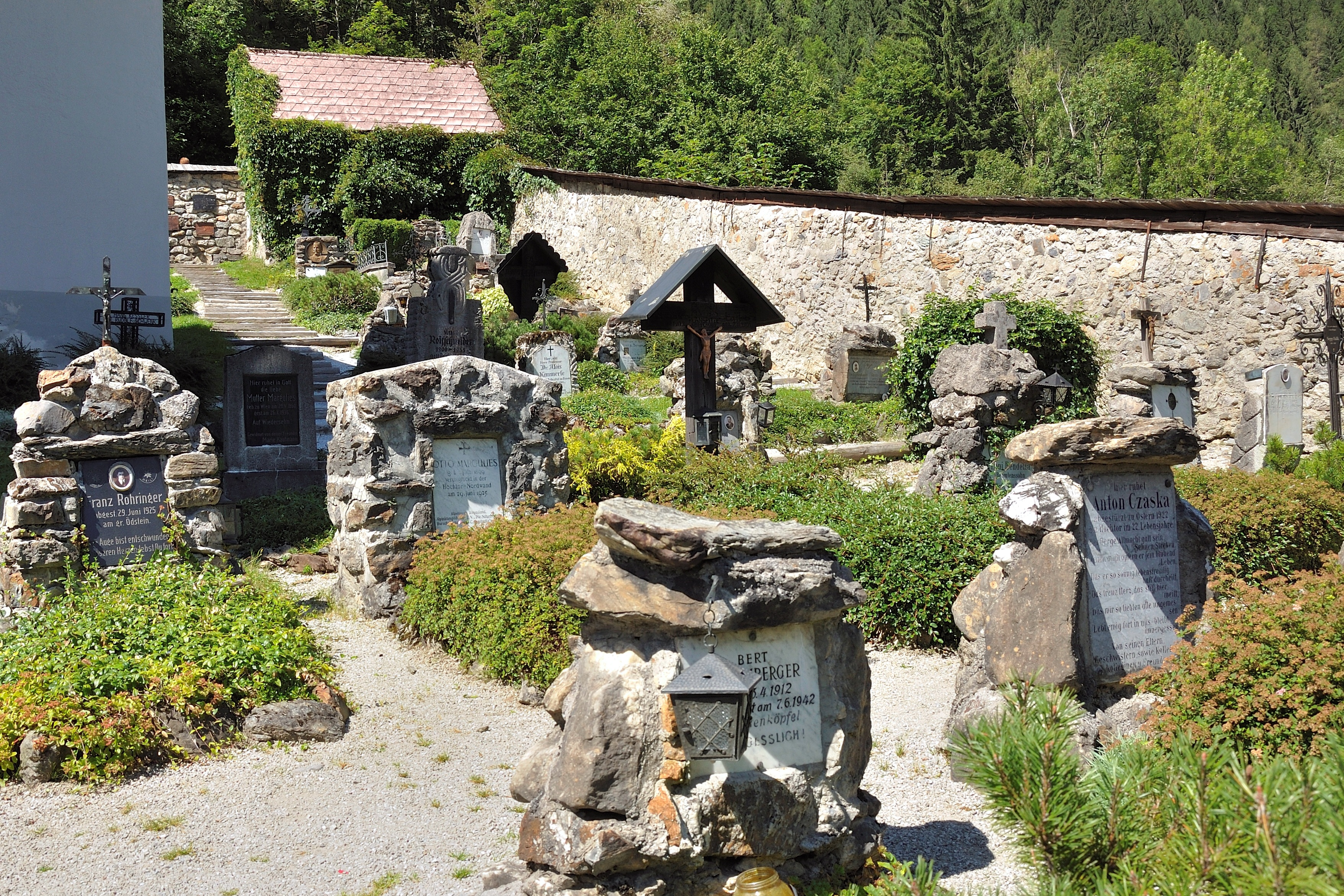 Sogen. Bergsteigerfriedhof